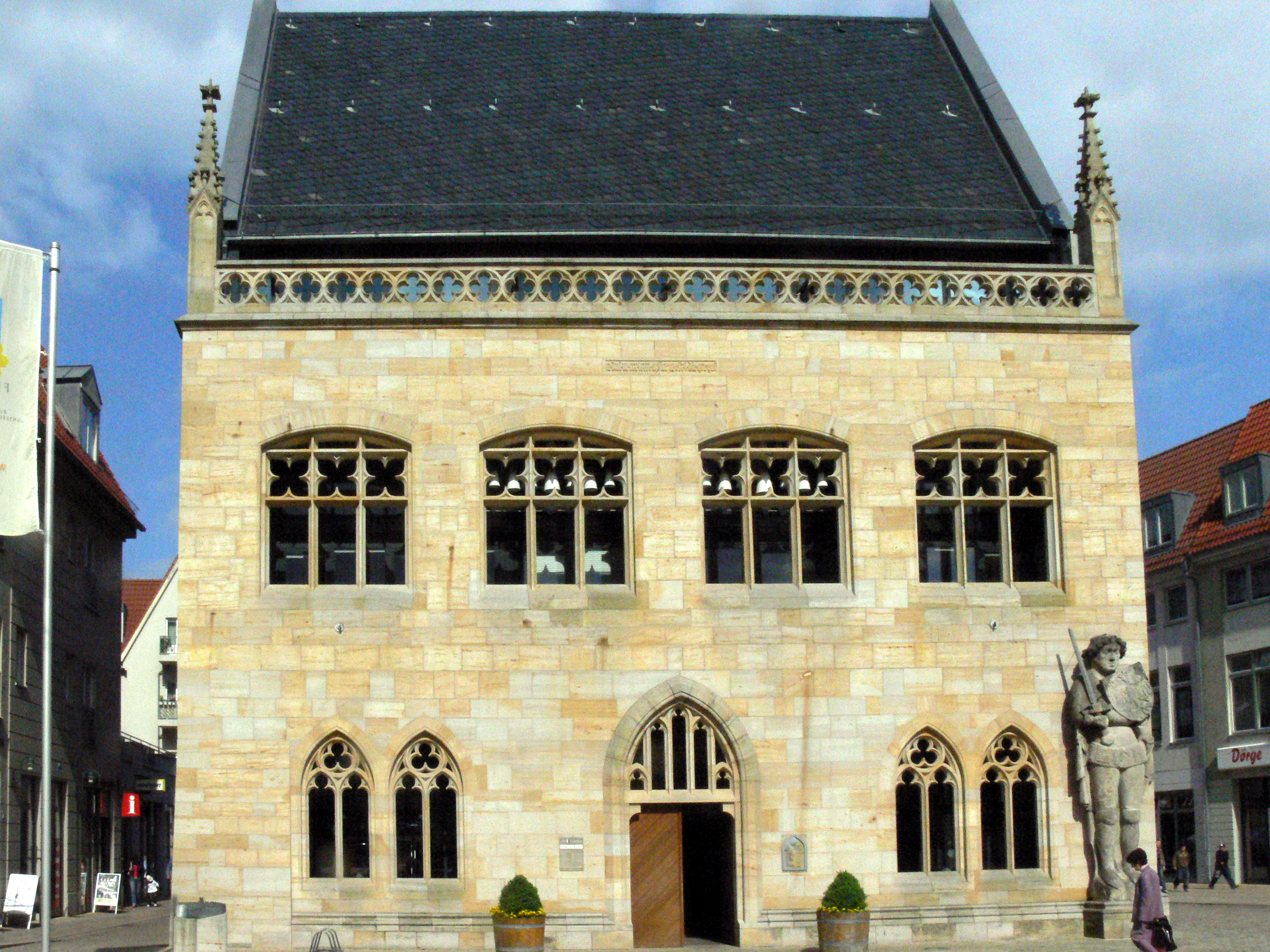 Rathaus in Halberstadt